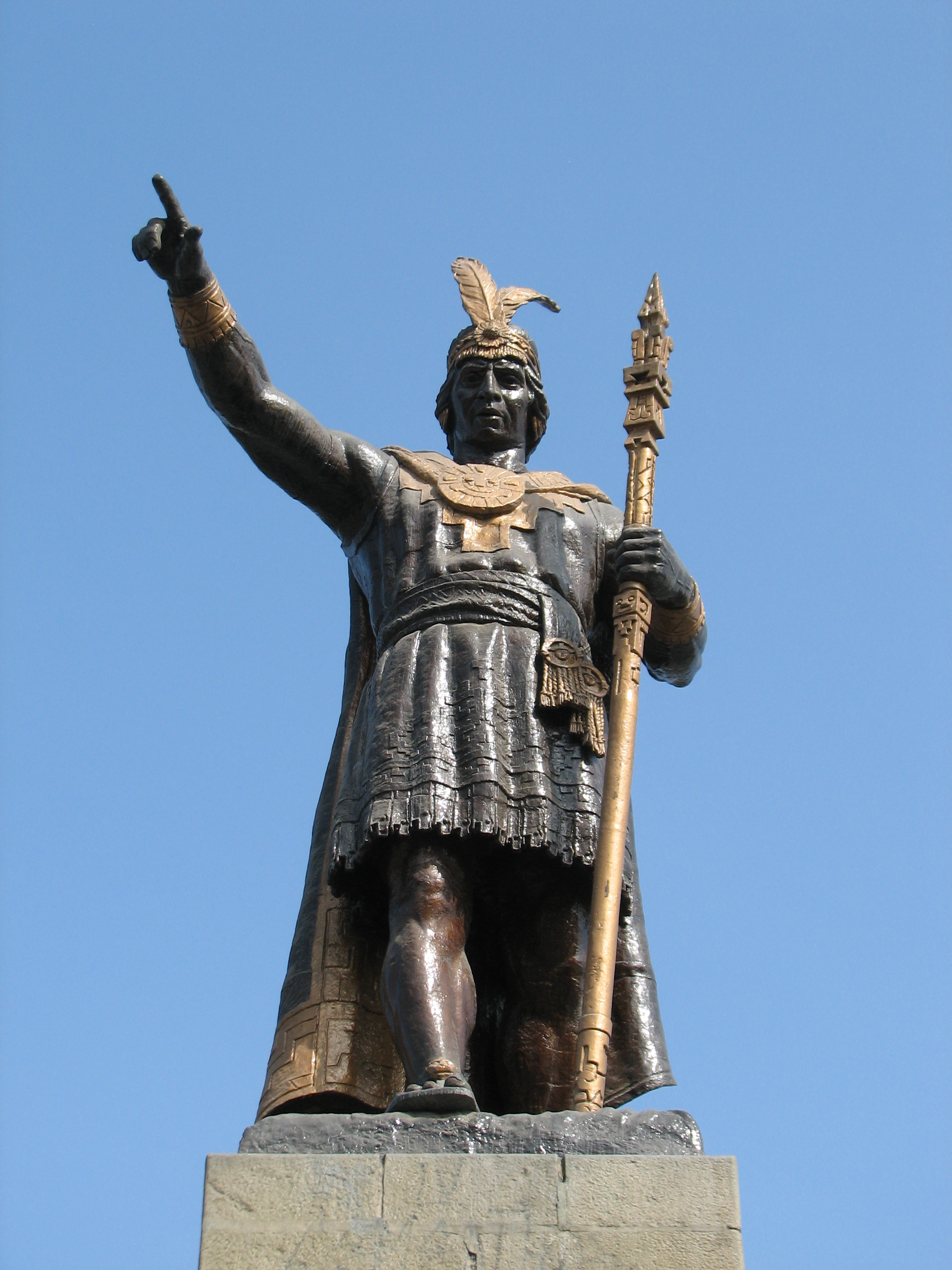 Statue of Manco Capac on Plaza Manco Cápac in La Victoria/Lima/Lima, Peru.